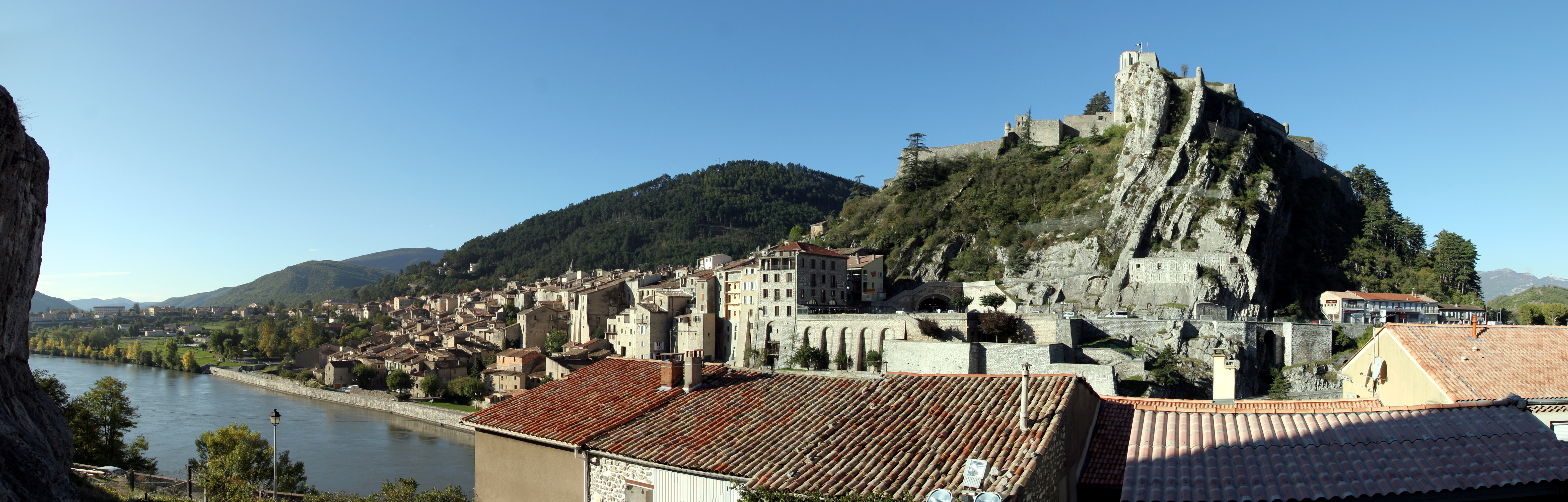 Die Zitadelle von Sisteron (Frankreich). Mit Hugin aus 4 Einzelaufnahmen zusammengesetzt. Horizontaler Bildwinkel: ca. 130°.